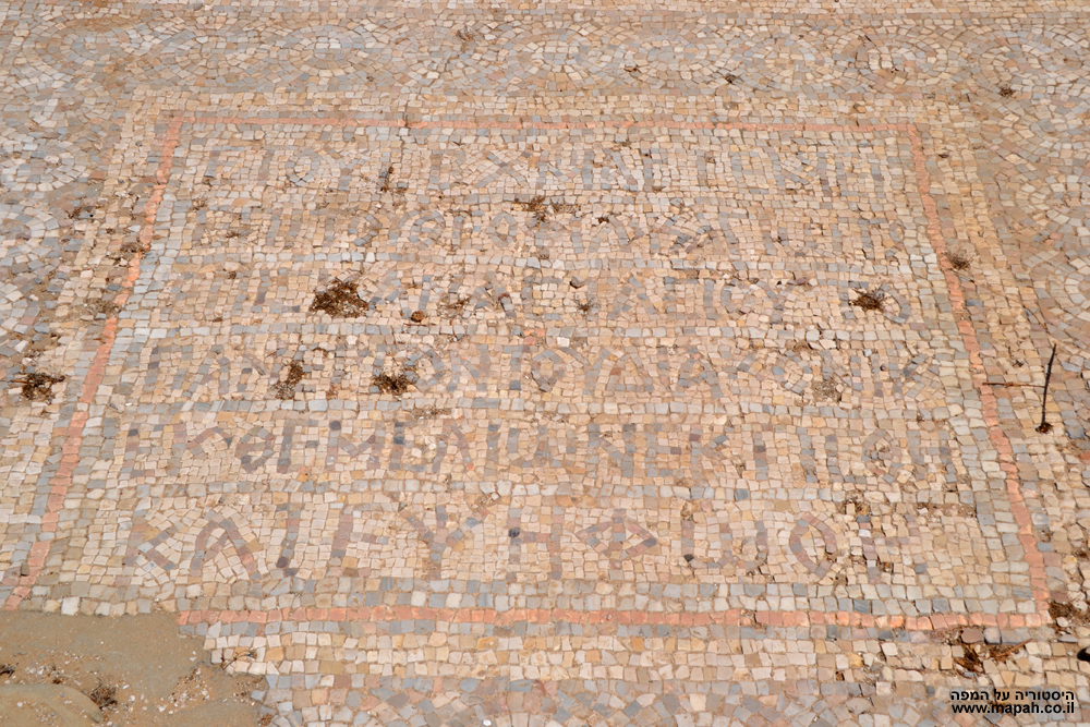 כיתוב באותיות יוניות מרצפת פסיפס של כנסייה עתיקה באשקלון